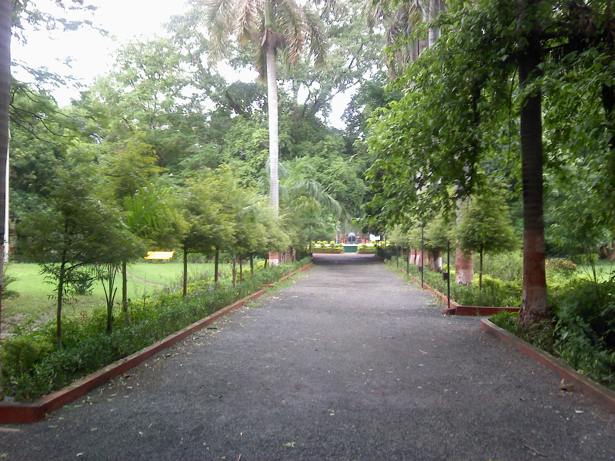 Maharajbagh is a garden and zoo in Nagpur.